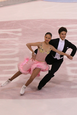 Oksana Klimova and Sasha Palomäki (FIN) at the 2009-2010 JGP Pokal der Blauen Schwerter.